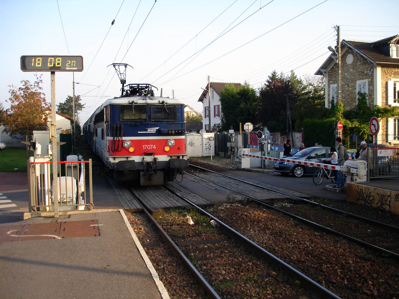 Gare de Vaucelles à Taverny (Val-d'Oise), France